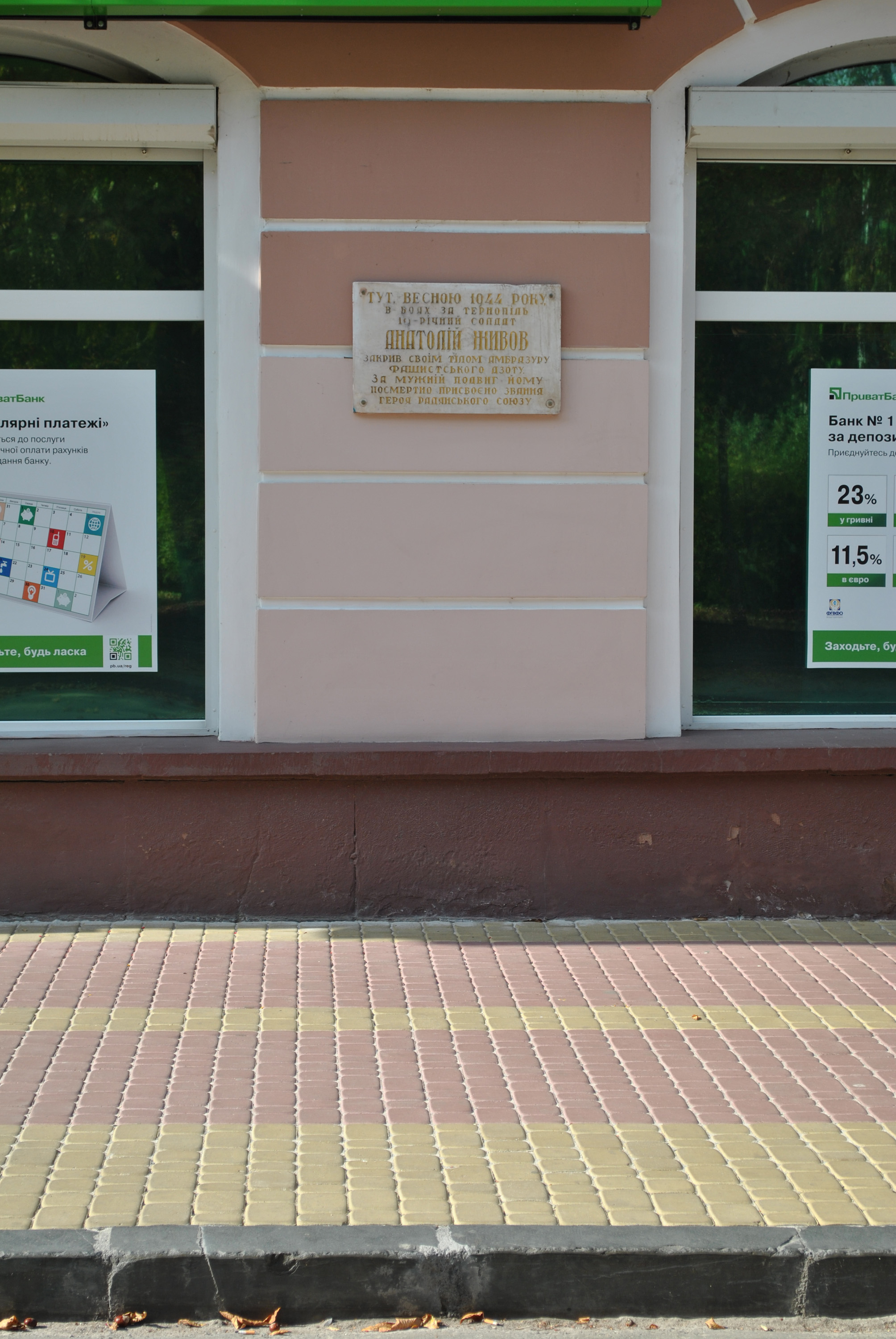 Пам'ятне місце подвигу Героя Радянського Союзу Анатолія Павловича Живова на бульварі Т. Шевченка в Тернополі. Таблиця розміщена на буд. № 2 вул. Гетьмана Сагайдачного.